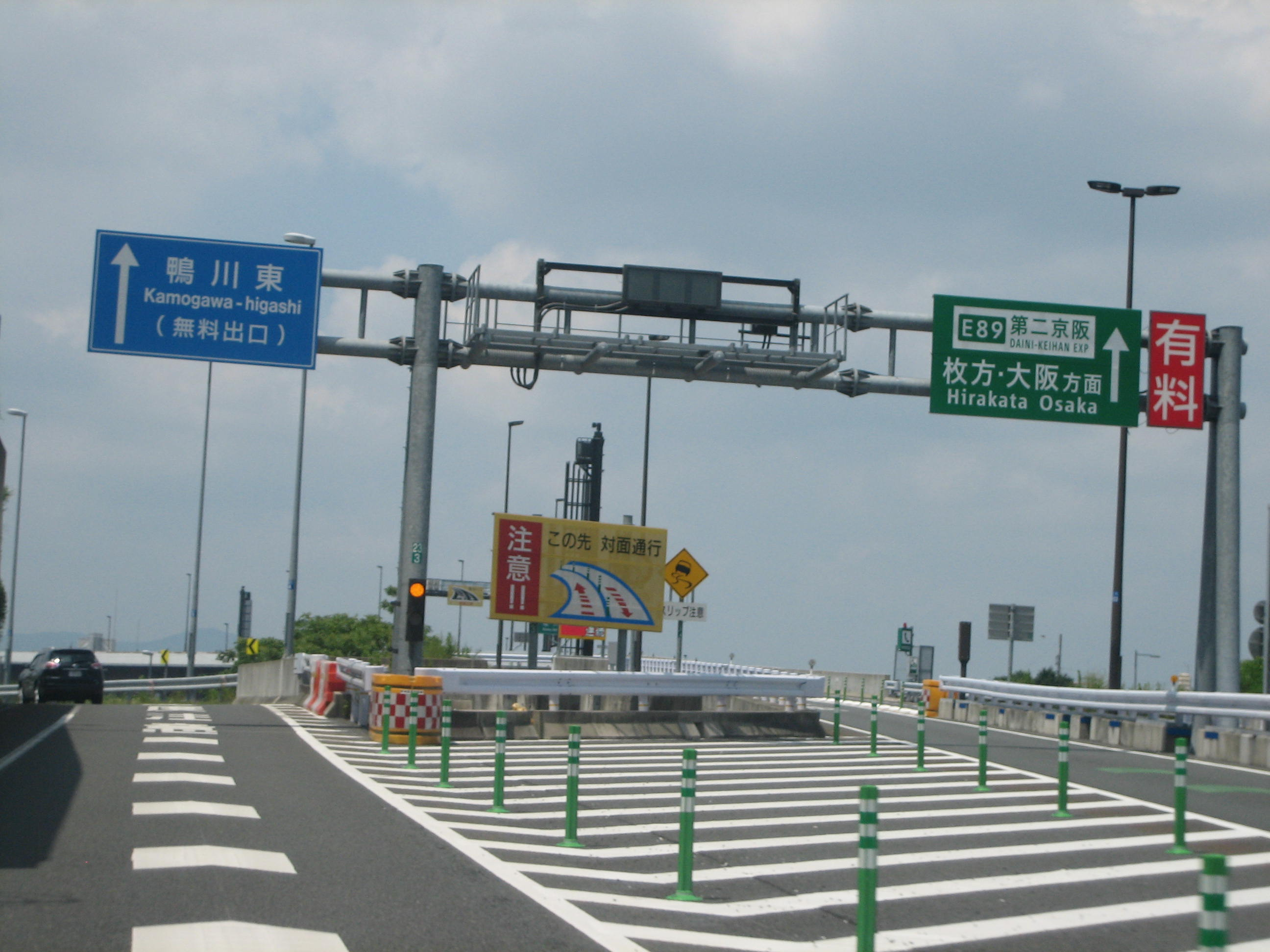 鴨川東ICの出口。